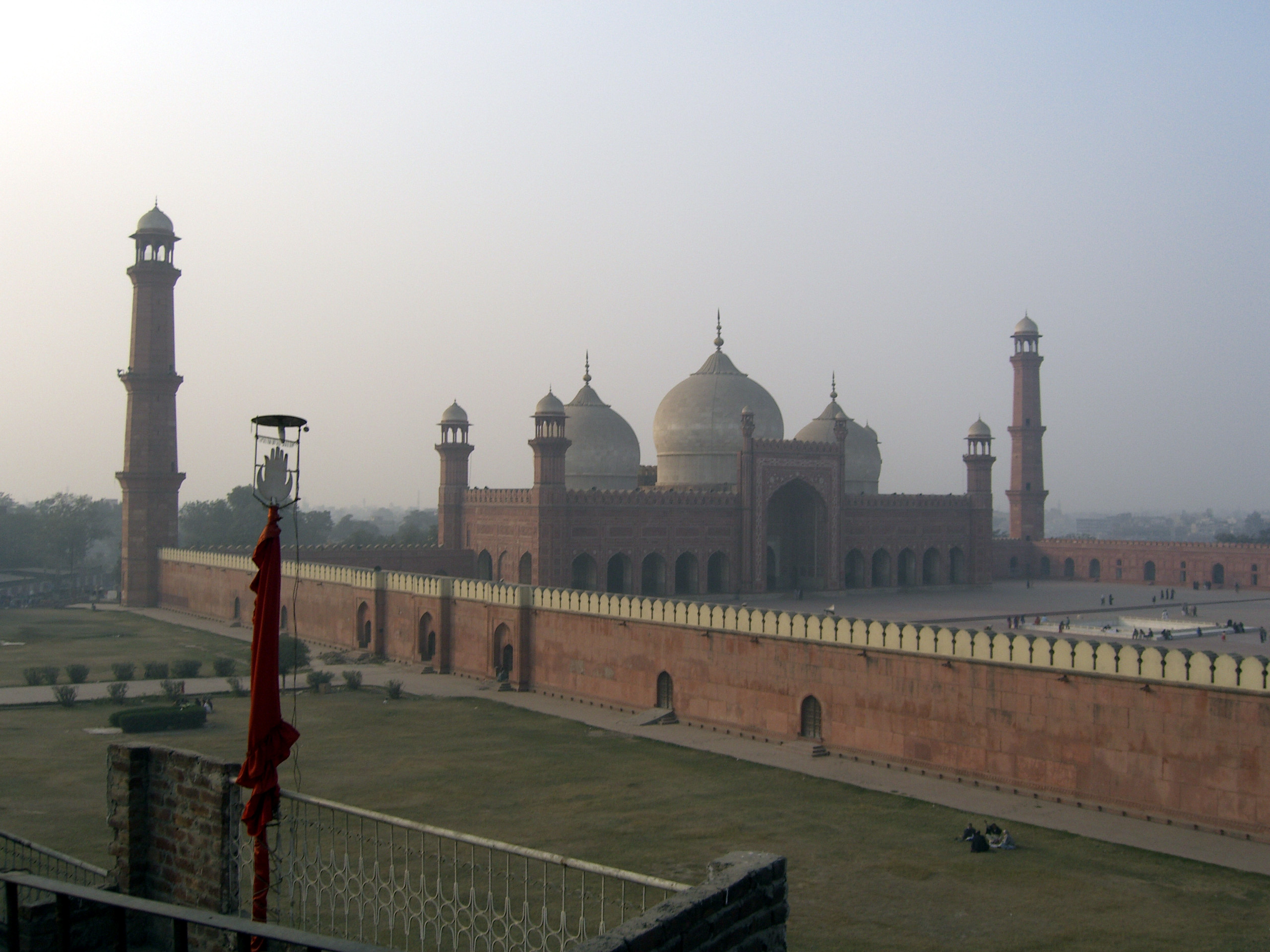 Badshahi Mosque, Lahore